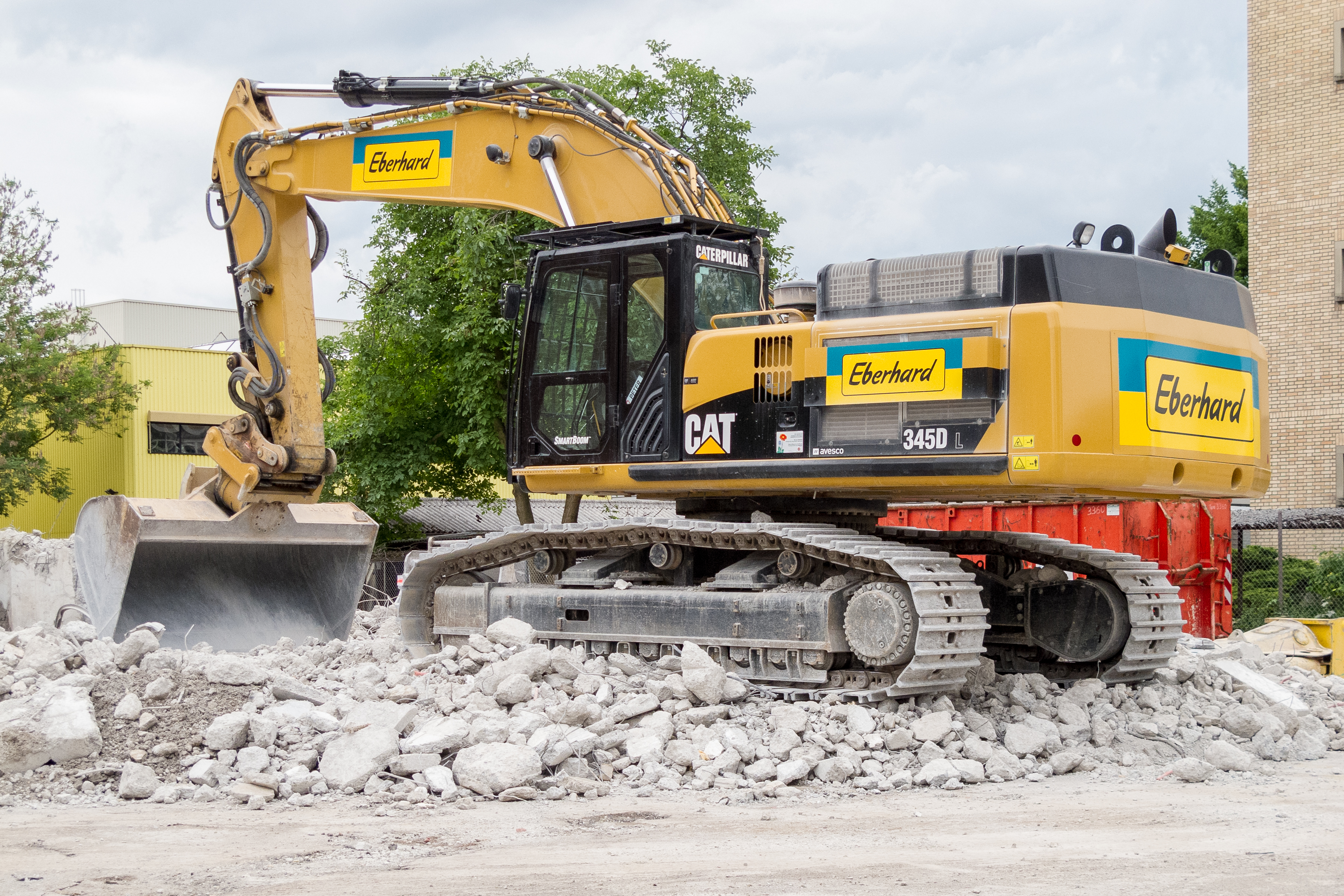 Caterpillar 345D L bei Abbrucharbeiten in Zürich-Oerlikon